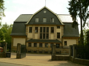 Villa Claire 2. Hauptgebäude in der Parkanlage der Villa Lilly